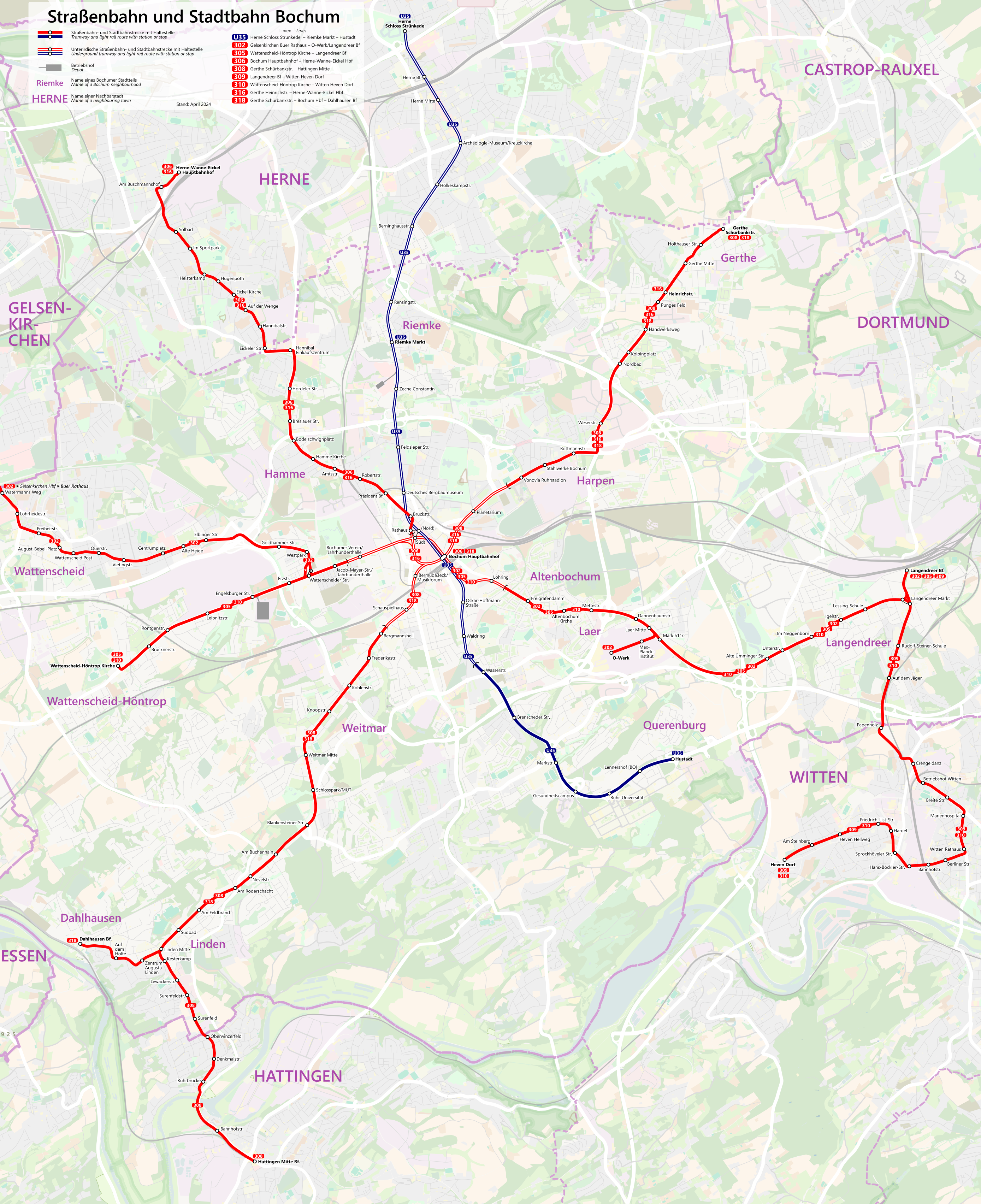 Streckenkarte der Bochumer Straßenbahn (Linien 302, 306, 308, 310 und 318) und der Stadtbahn (Linie U35). Beinhaltet nicht die Gelsenkirchener Strecken, jedoch die von Bochum ausgehenden Strecken nach Herne, Witten und Hattingen. This map may be incomplete, and may contain errors. Don't rely solely on it for navigation.